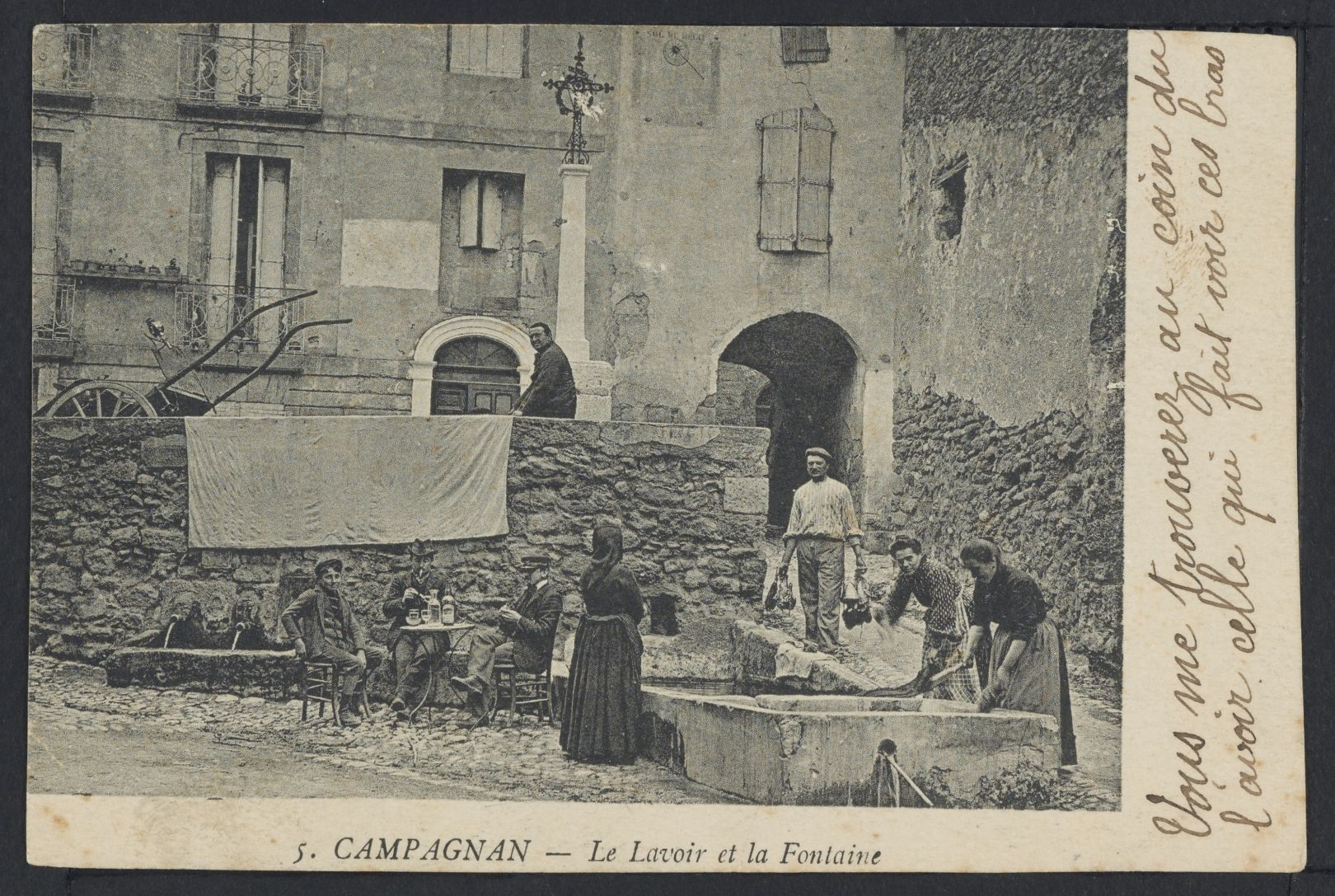 Campagnan. - Le lavoir et la fontaine : carte postale.